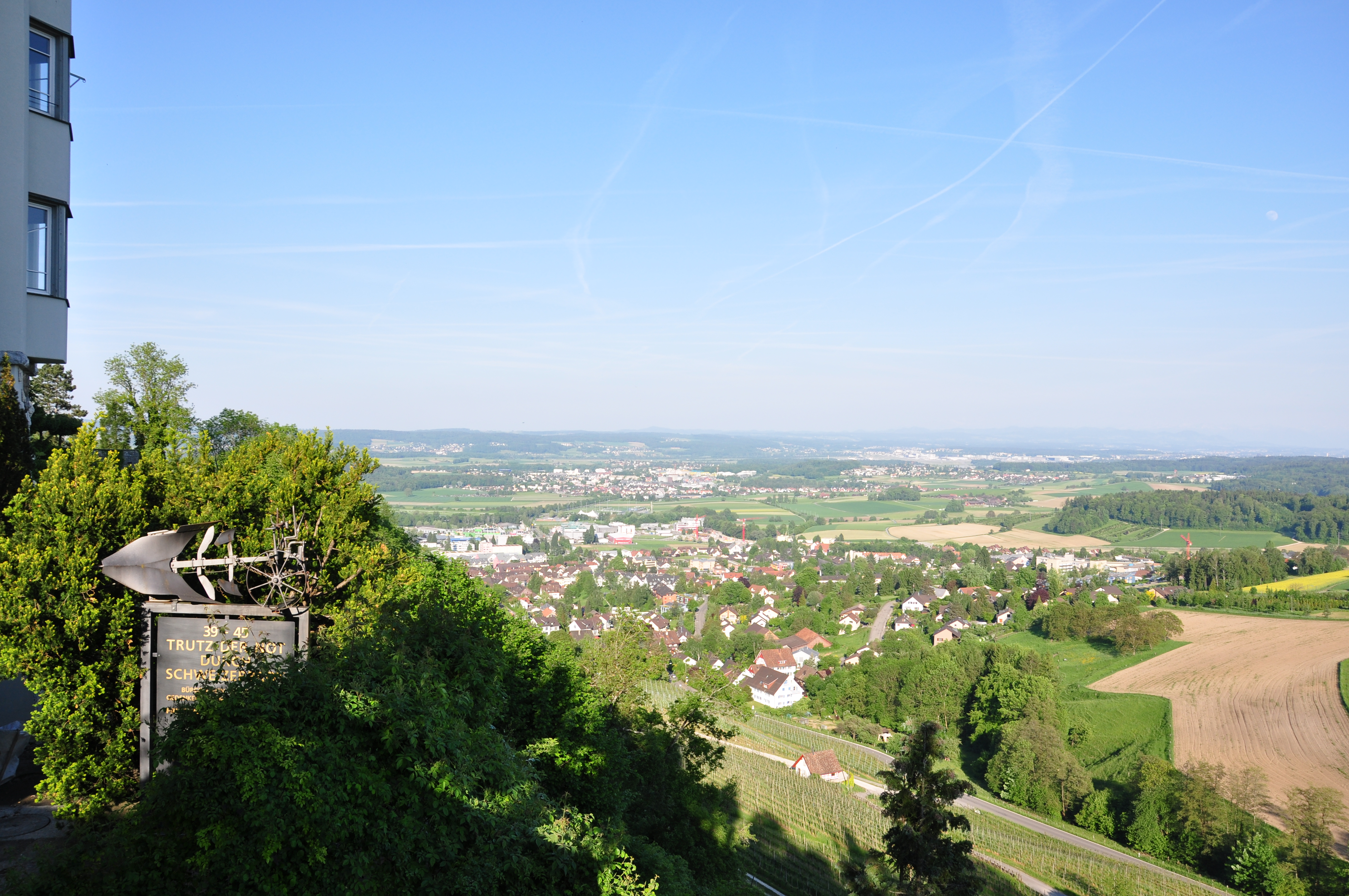 Dielsdorf and Niederhasli as seen from Regensberg (Switzerland)